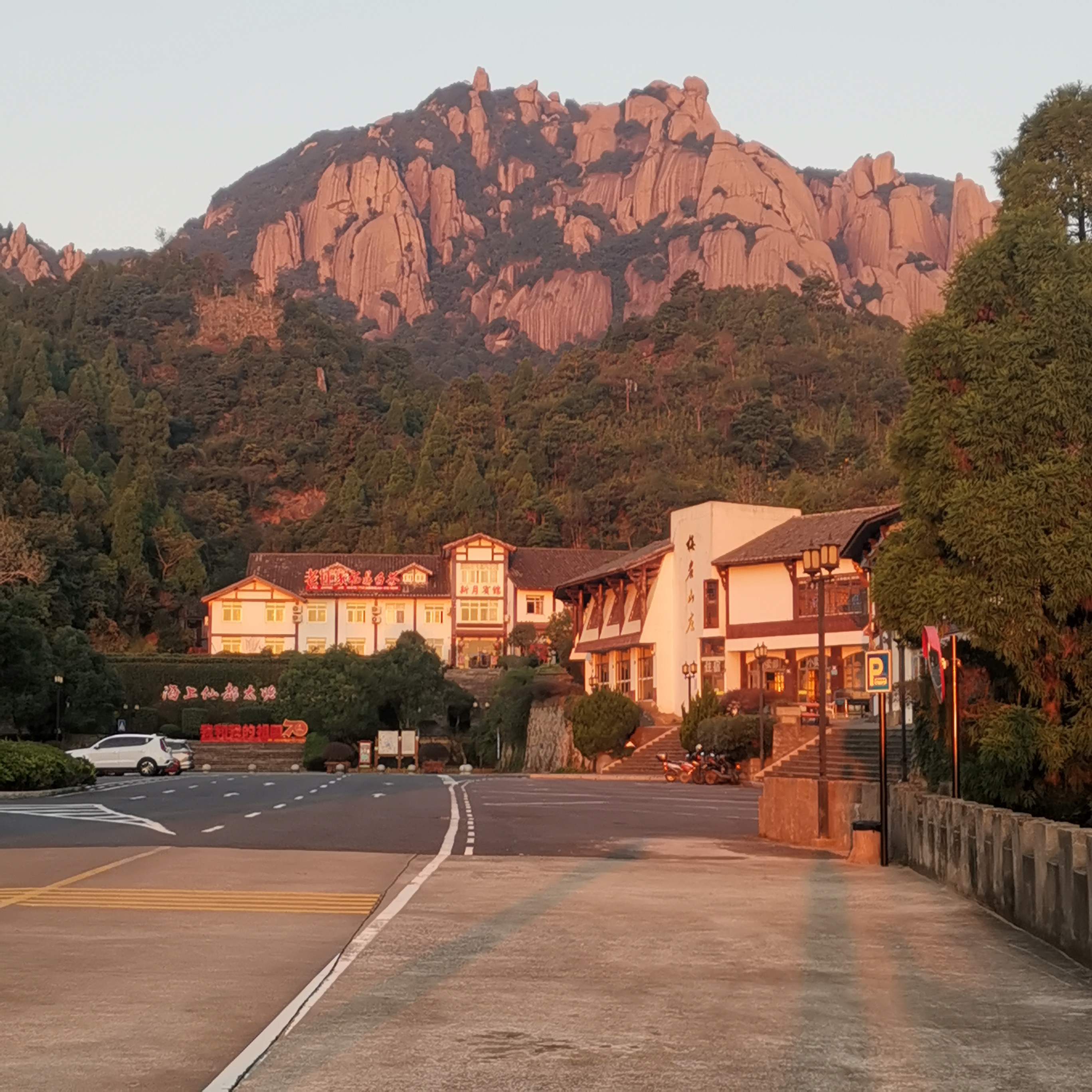 中文（中国大陆）: 太姥山